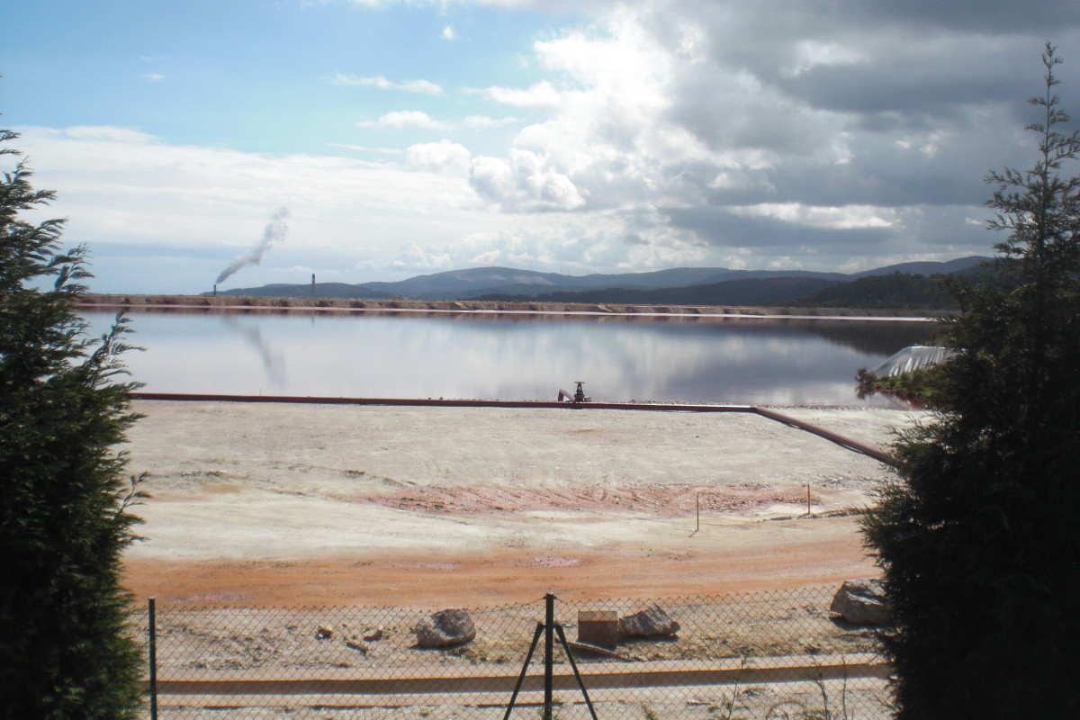 Balsa e tubaxes da factoría de Alcoa en Xove.